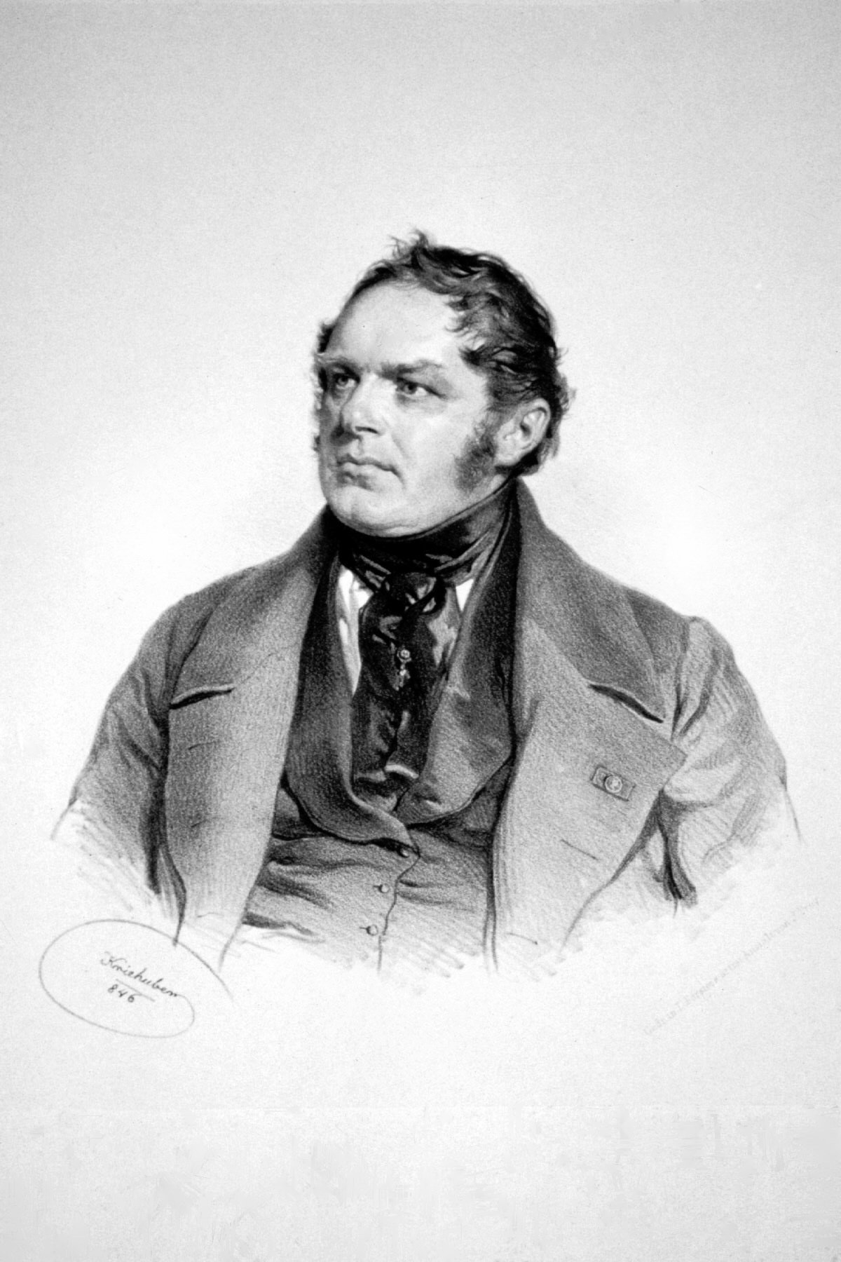 Franz Klein Sen. (1794-1855), Freiherr von Wisenberg., Unternehmer. Lithographie von Josef Kriehuber, 1846